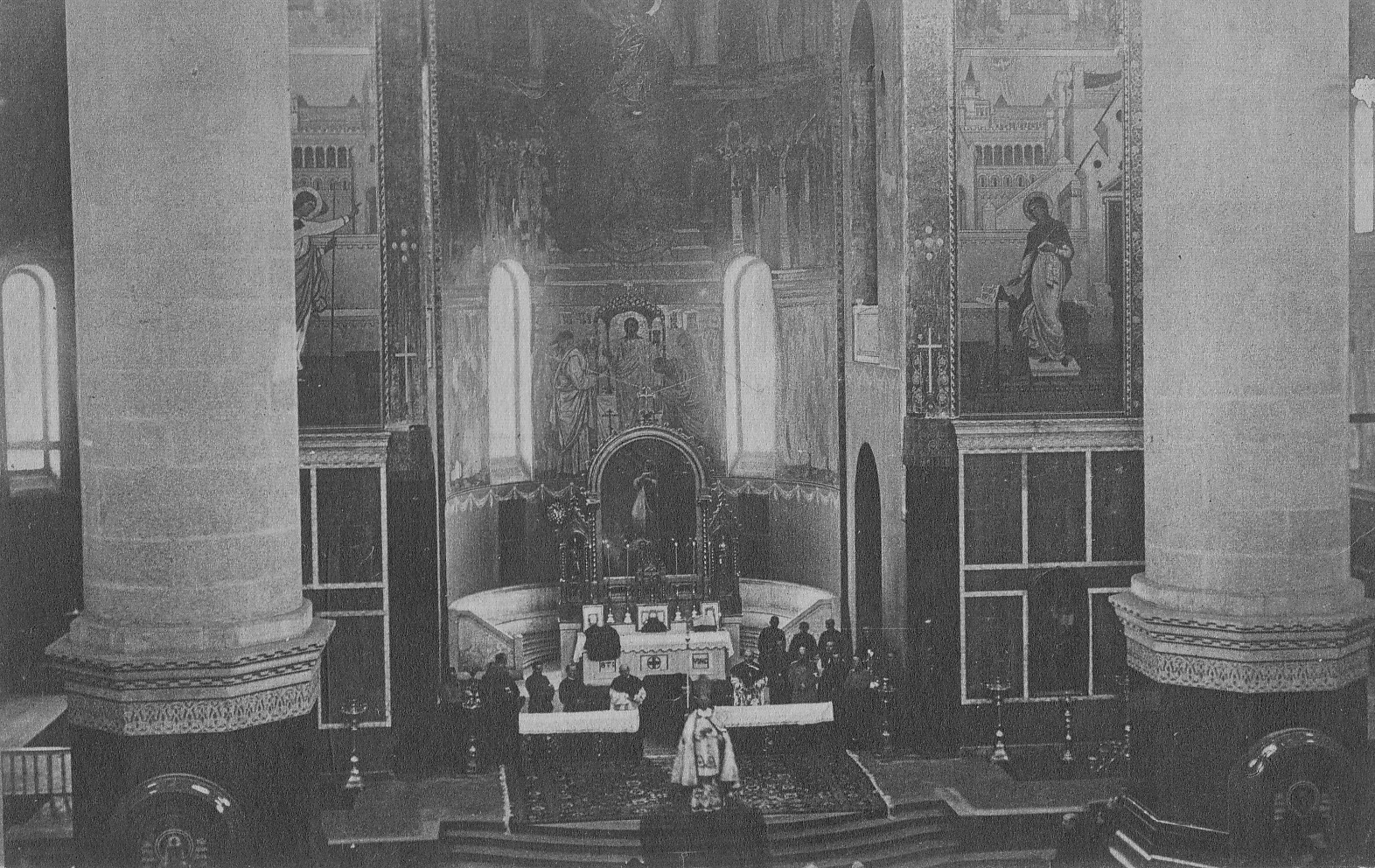 Uroczystości otwarcia wojskowego kościoła katolickiego w soborze na placu Saskim